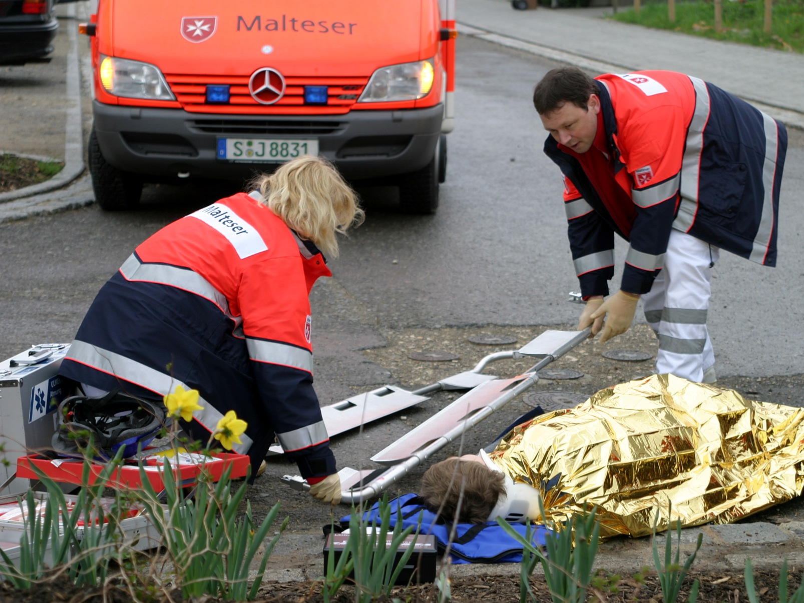 Rettung eines Notfallpatienten durch eine Rettungsmannschaft des Malteser Hilfsdienstes (Hinweis: Die Szene ist gestellt!)